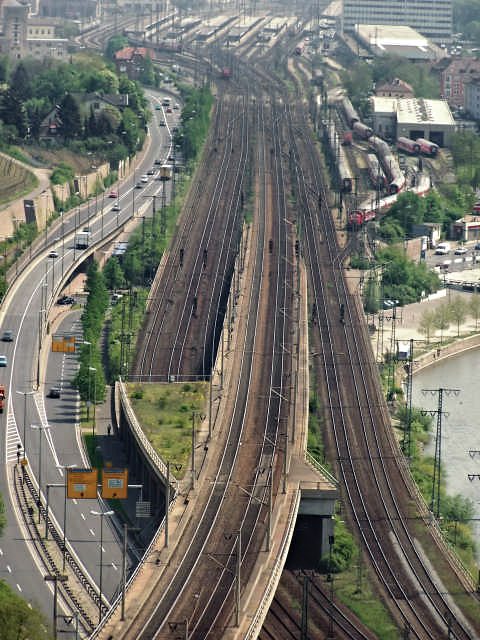 Gleistrassen des Hauptbahnhofes in Würzburg und nördlicher Stadtring (B 27), Blick von Westen aus ("Stein"-Berg)